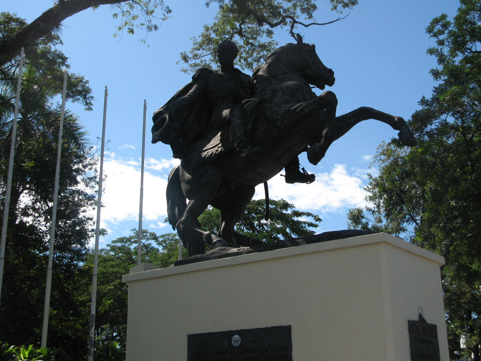 Parque "Simón Bolivar". San Salvador, El Salvador